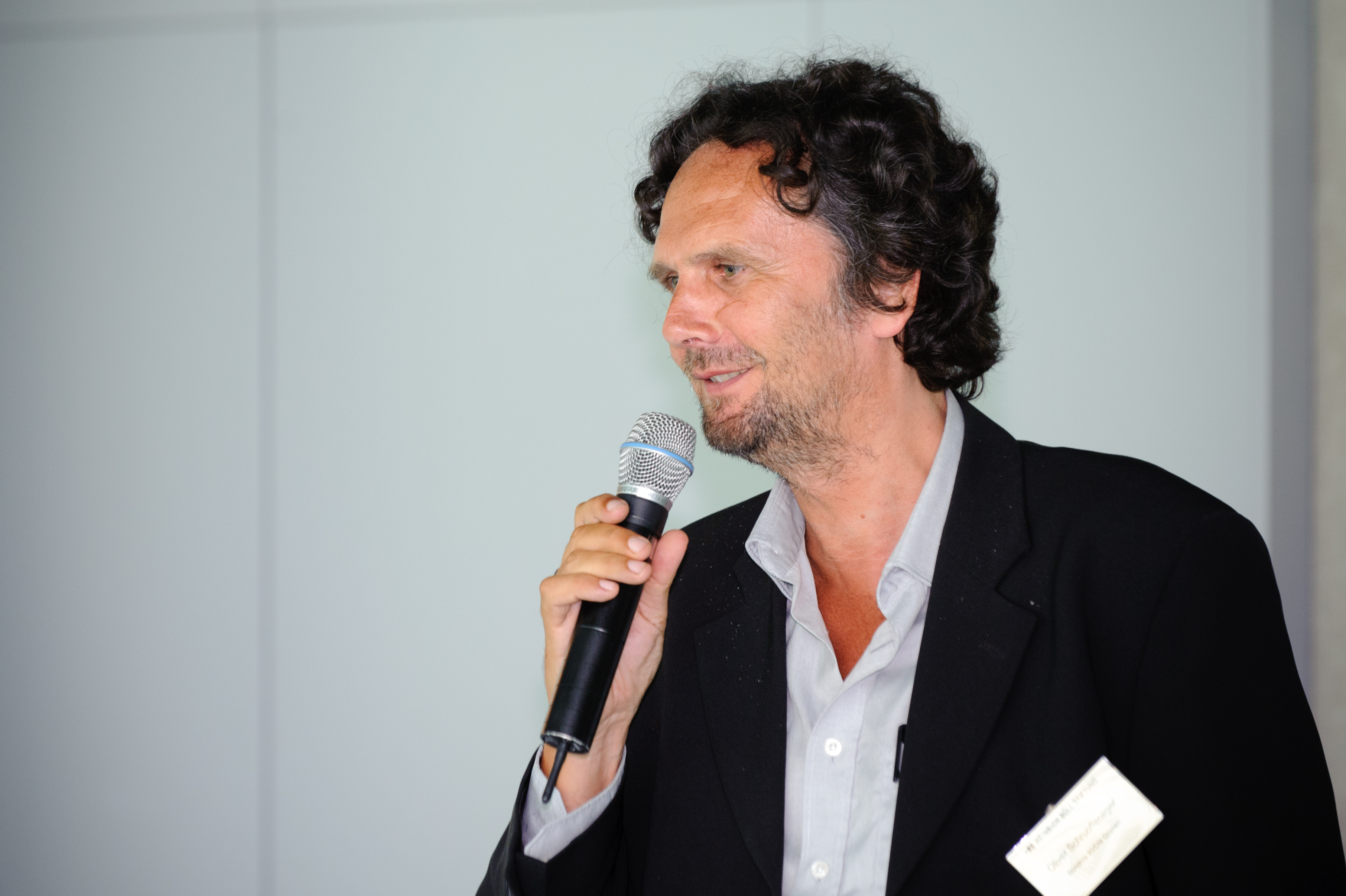 Oliver Schruoffeneger (MdA Bündnis 90/Die Grünen im Berliner Abgeordnetenhaus) Foto: Stephan Röhl